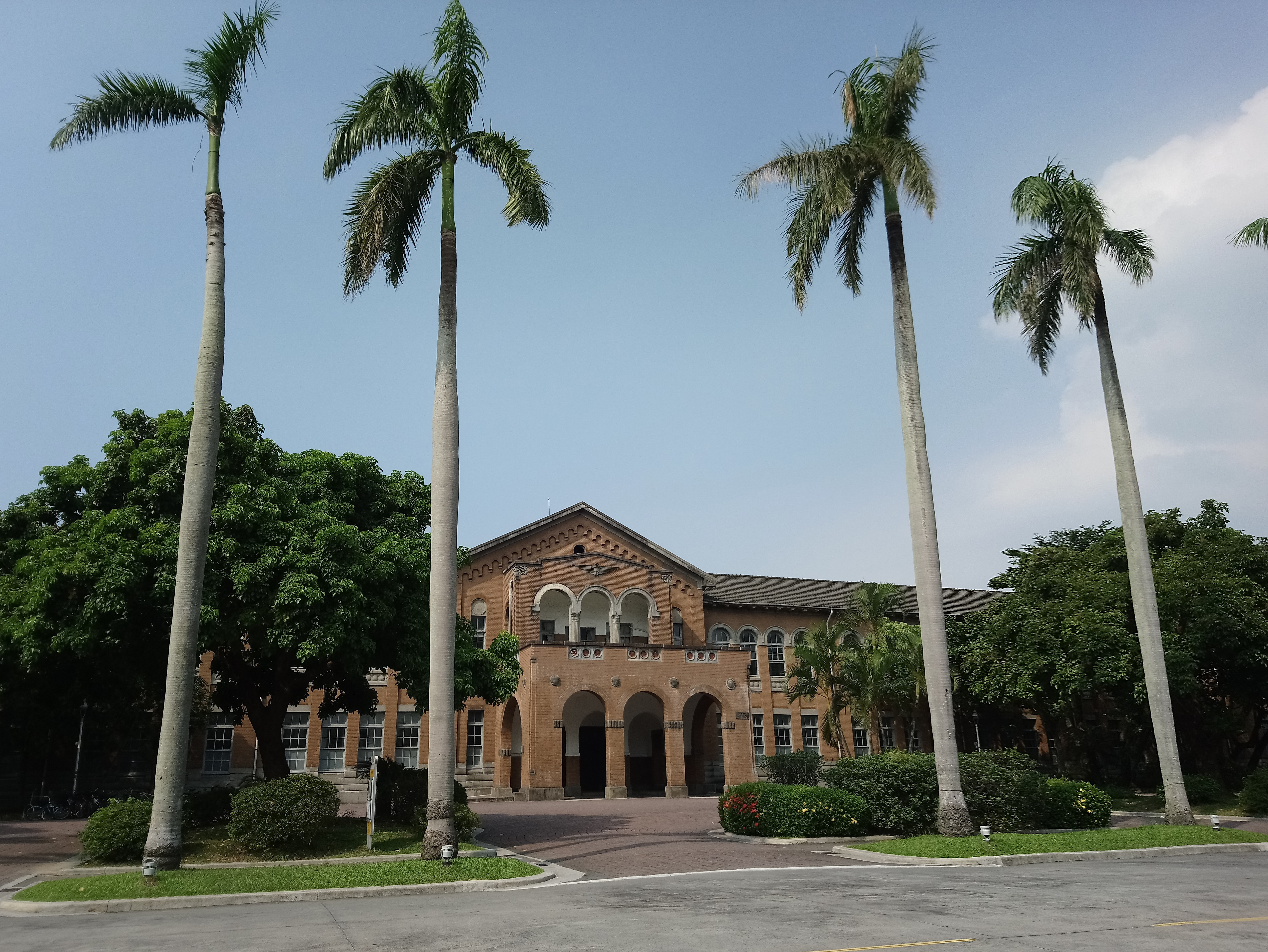 國立臺灣大學文學院,台北市大安區學府次分區學府里